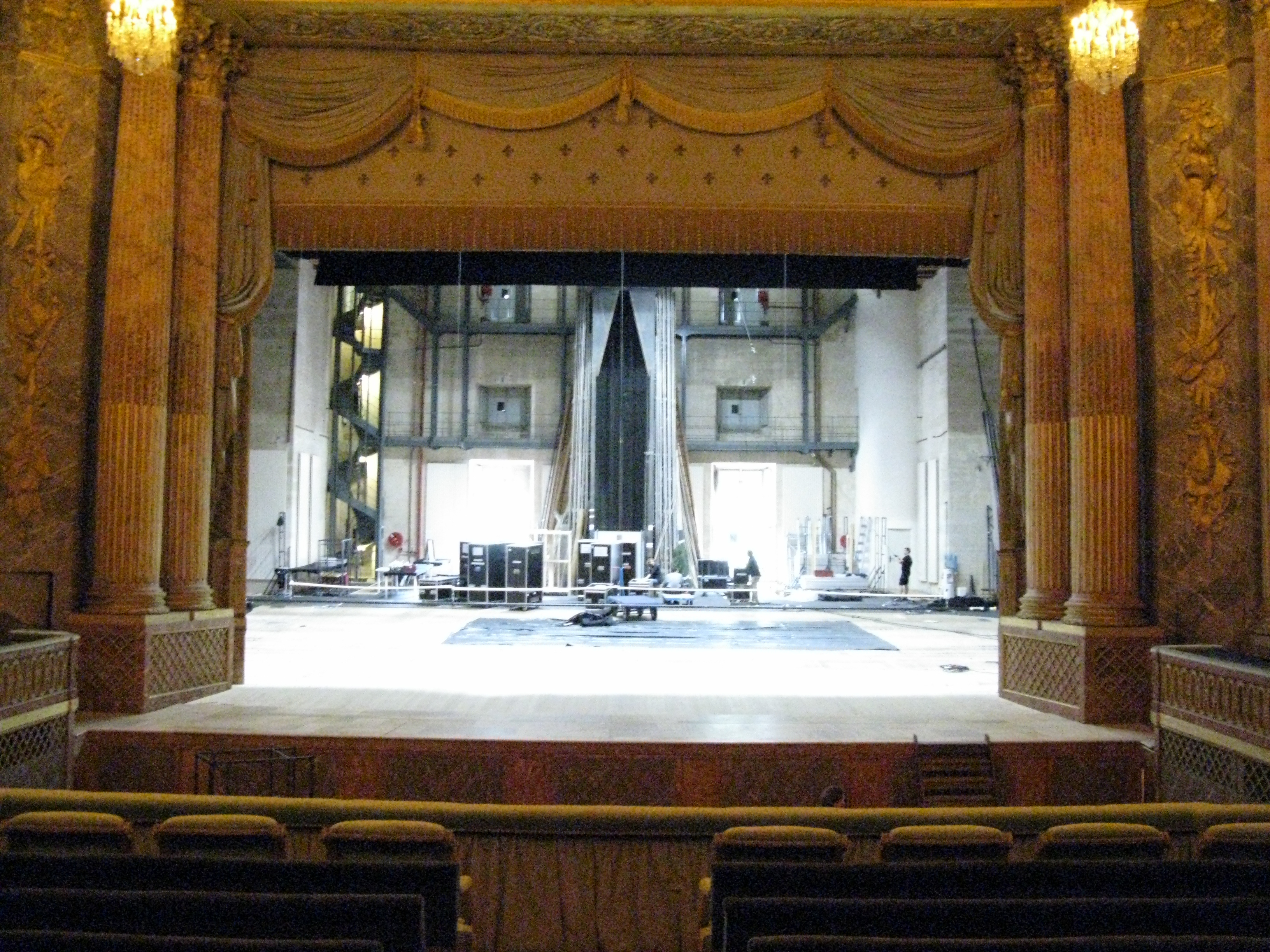 scène de l'opéra royal du château de Versailles